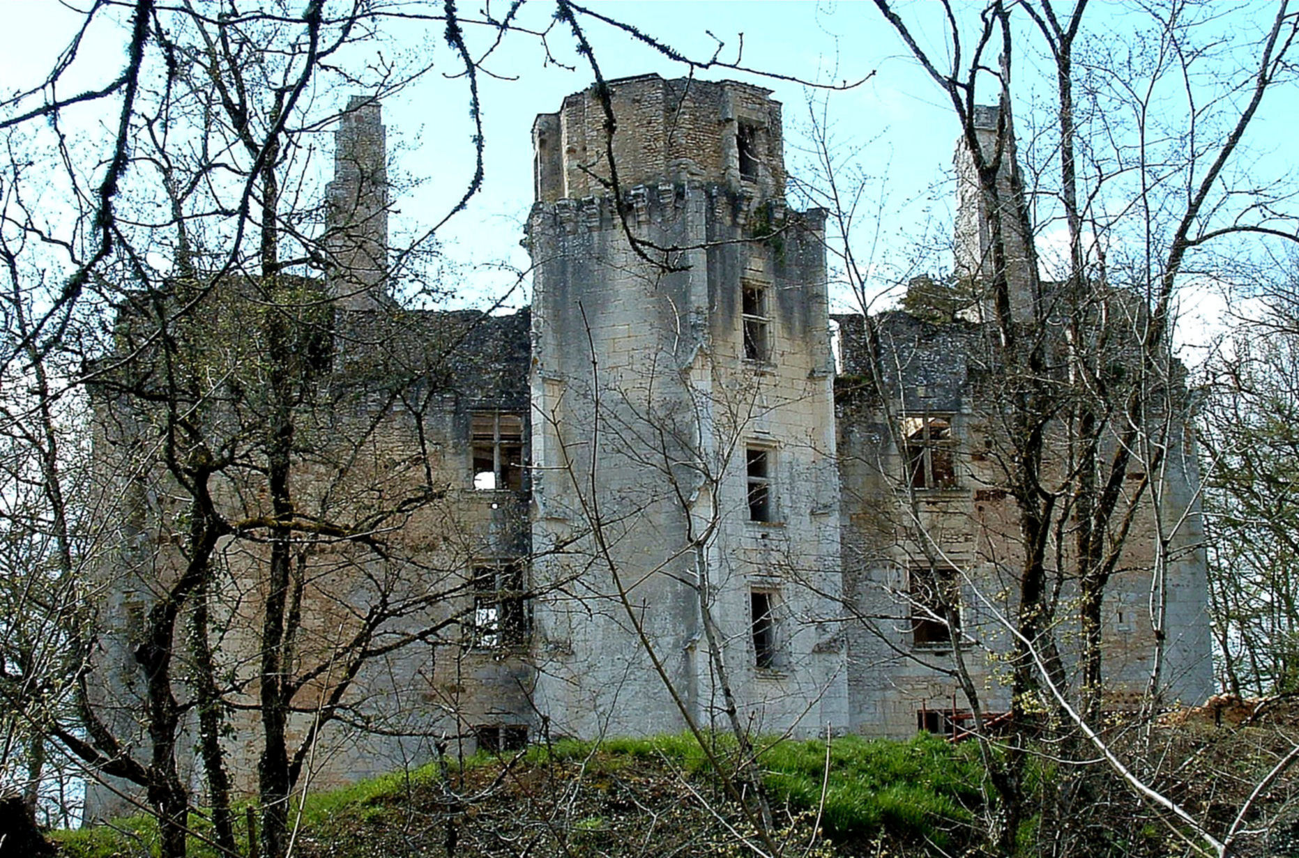 Château de l'Herm - Côté escalier (côté est)